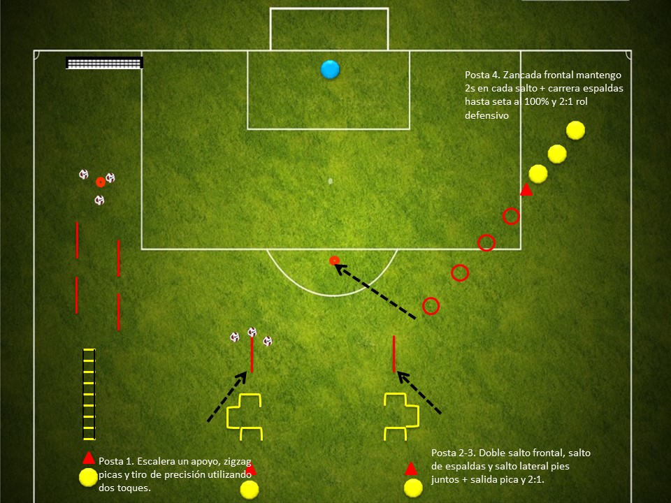 Gráfico de un ejercicio para entrenamiento de jugadores de fútbol